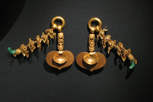 국보 제156호 무령왕 금귀걸이 A pair of king's earrings, made from gold and jade, early 6th century (Baekje). From tomb of King Munyeong. 156th National Treasure of Korea.